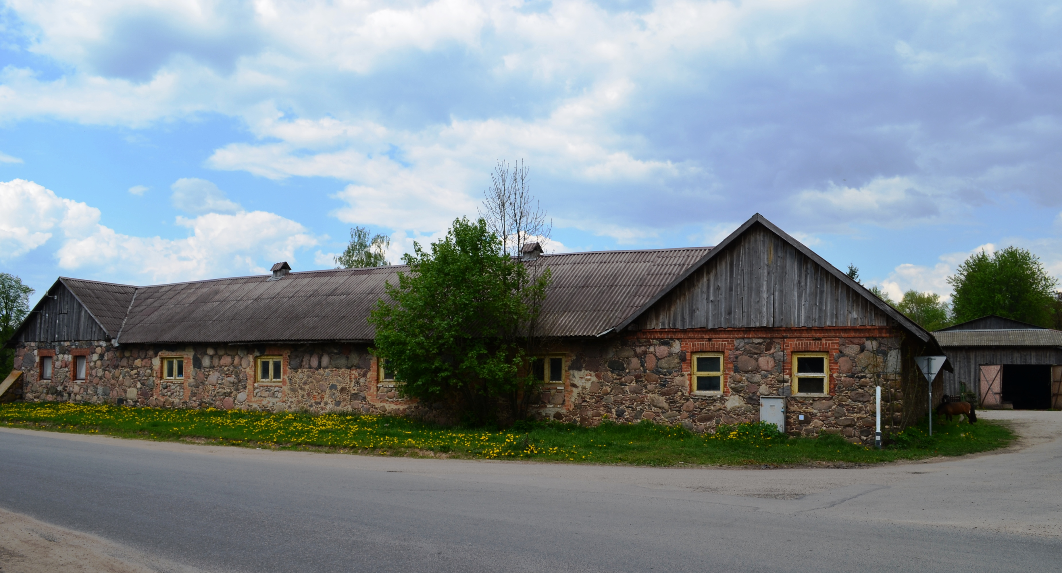 Dvaro arklidės, Raudondvaris, Riešės sen., Vilniaus raj.